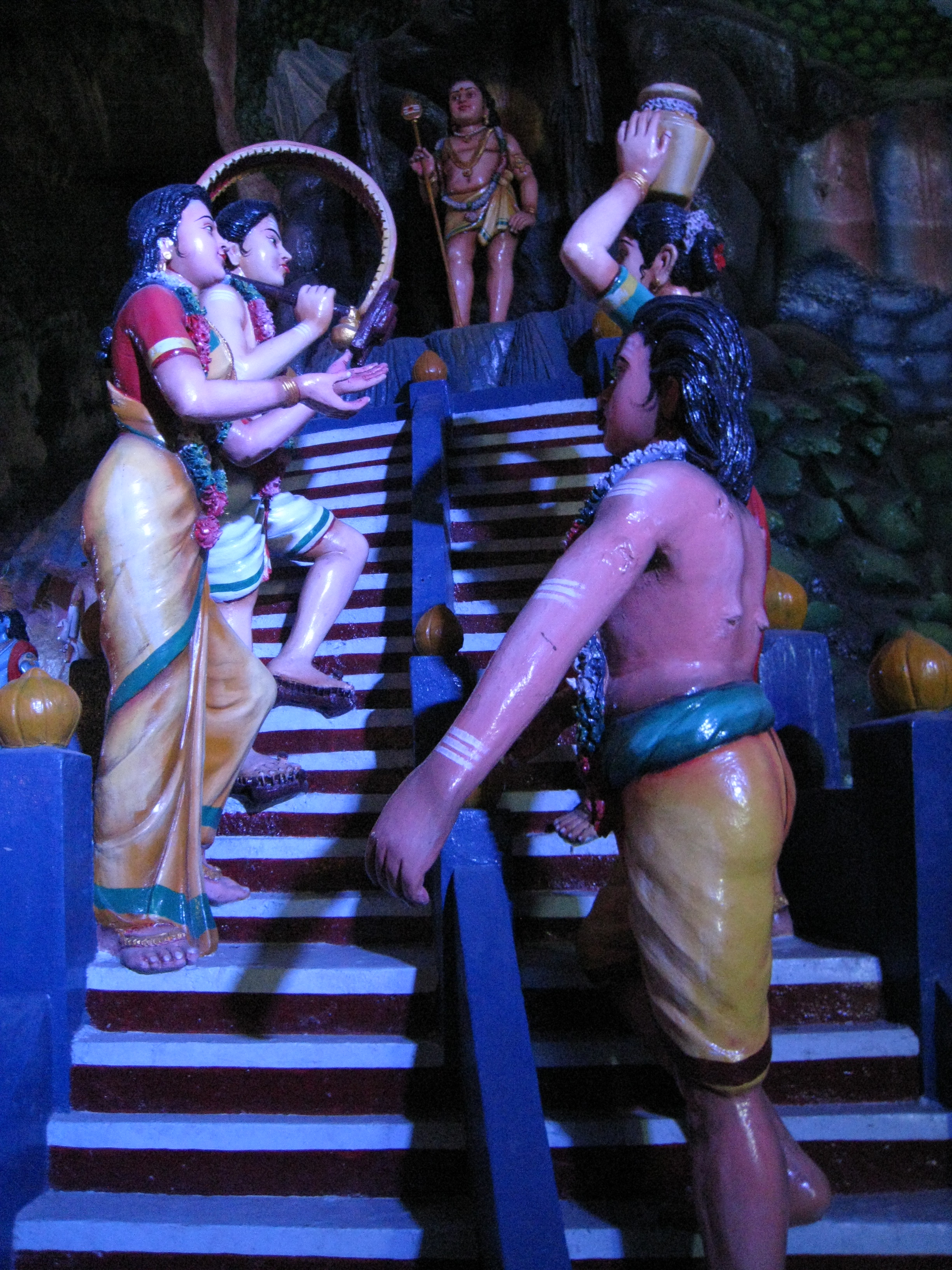 48 Bhaktas pay respect to Lord Murugan, at Batu Caves, Kuala Lumpur